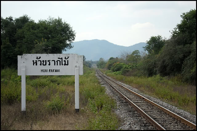 ป้ายทางทิศเหนือ